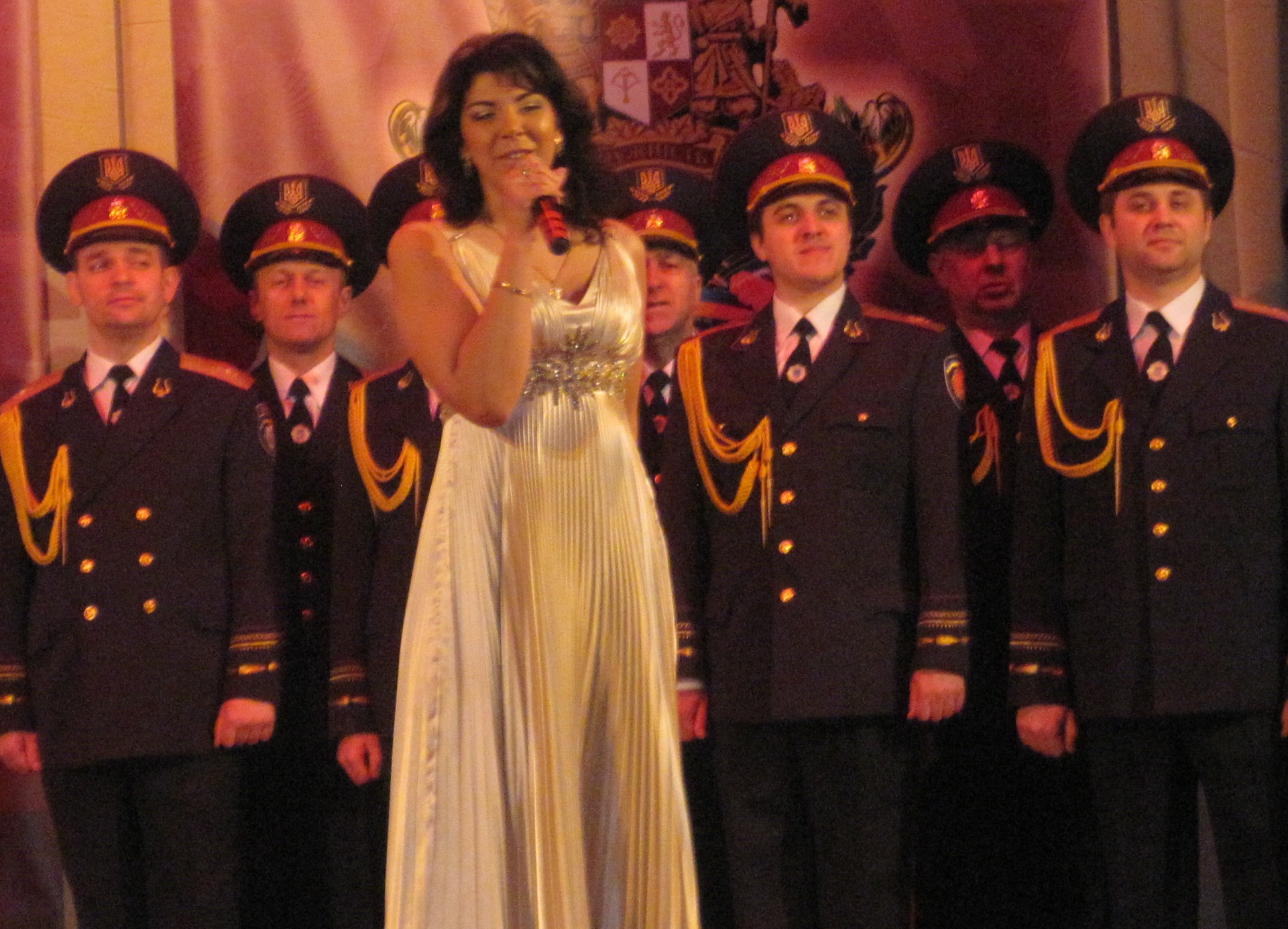 На сцені заслужена артистка України Елеонора Скиданова з артистами Академічного ансамблю МВС України